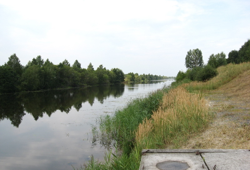 Селішча. Дняпроўска-Бугскі канал. Водападзел басейнаў рэк Дняпра і Віслы. Памятны знак устаноўлены ў 2009 годзе. Рэспубліканскім унітарным эксплуатацыйна-будаўнічым прадпрыемствам "Днепа-Бугскі водны шлях" у гонар старажытнага беларускага воднага шляху, які стагоддзямі злучае народы Усходу і Захаду